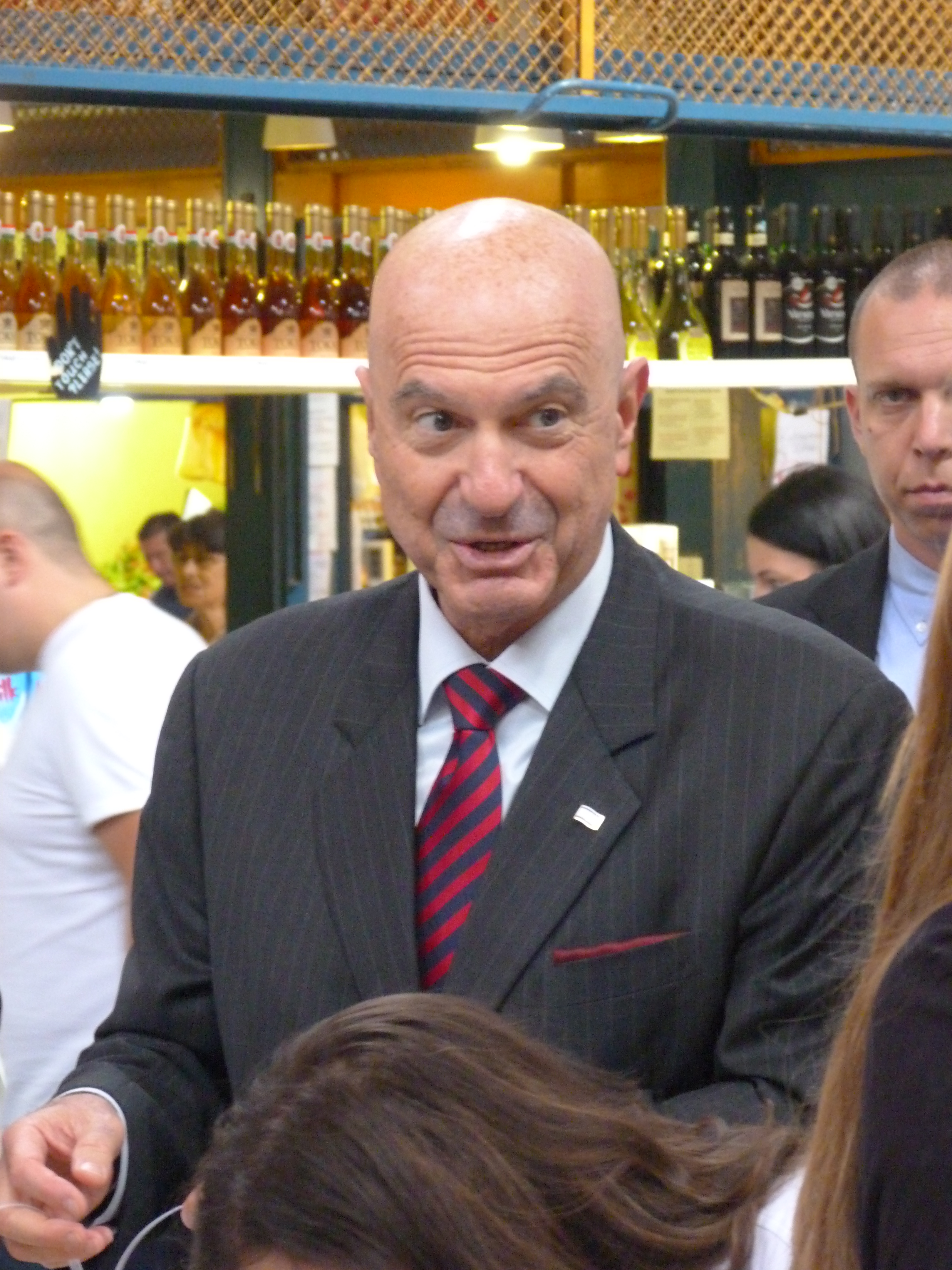 Live on 30th of August, 2013. Budapest, Great Market Hall, Nagycsarnok. Ilan Mor, ambassador of Israel State to Hungary. Days of Israel. A felvétel 2013. augusztus 30 –án pénteken készült Budapesten, a Nagycsarnokban. Ilan Mor, Izrael magyarországi nagykövete. Izraeli napok a Nagycsarnokban. ©© Derzsi Elekes Andor, Budapest, 2013, You are authorised to use these photos and vids under Creative Commons – even for commercial, for profit purposes. Photos must be attributed to Derzsi Elekes Andor. All of the photos and vids in the Metapolisz DVD line are under Creative Commons and can be used even for commercial – for profit – purposes. Recommended Citation Derzsi Elekes Andor: Metapolisz DVD line